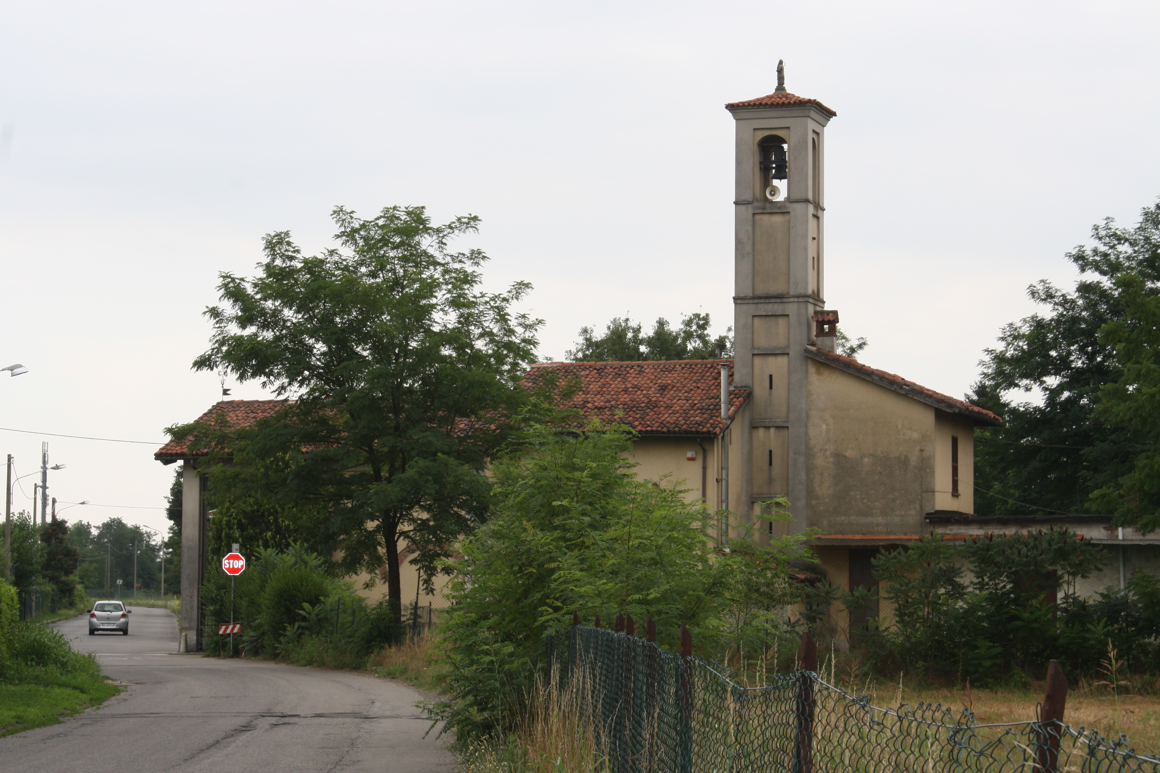 Chiesa della Madonna in Veroncora a Busto Arsizio, vista da nord.